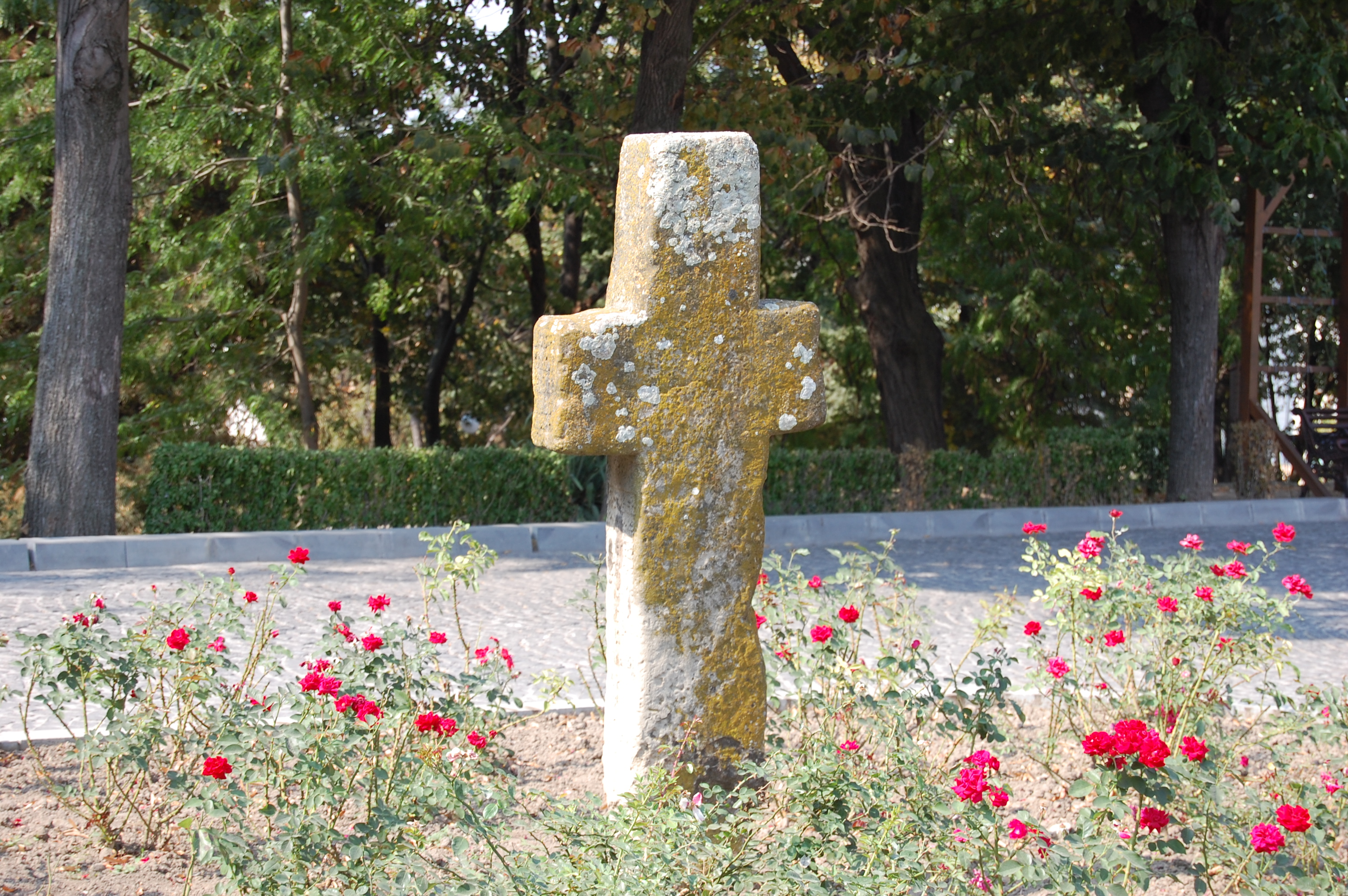 Cruce de piatra, 1826, Parcul Trandafirilor Craiova